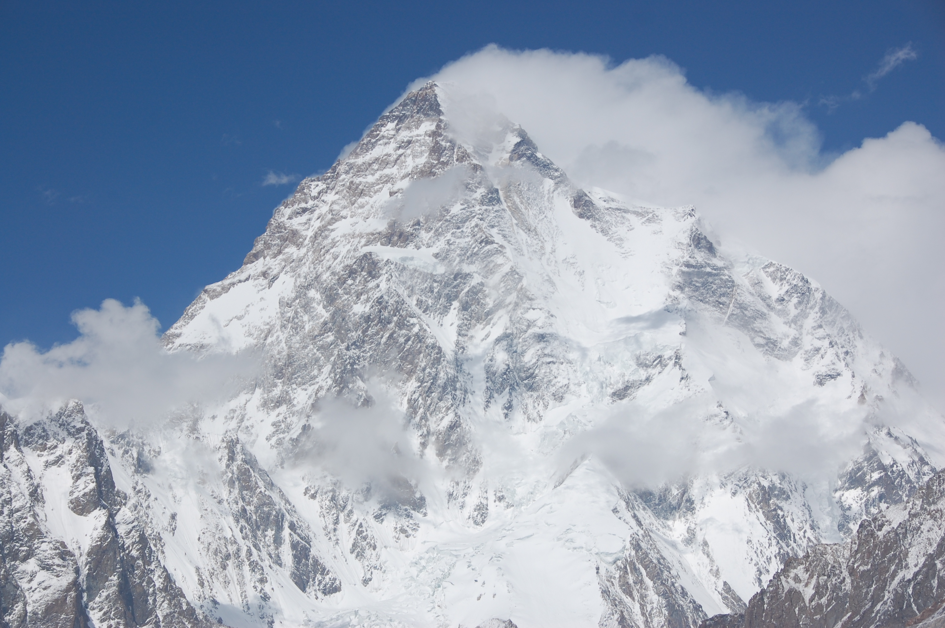 K2